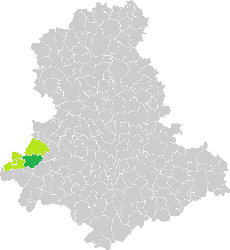 Carte de situation de la commune de Vayres (en vert foncé) dans le votre Canton (en vert clair) sur une carte des communes de la Haute-Vienne